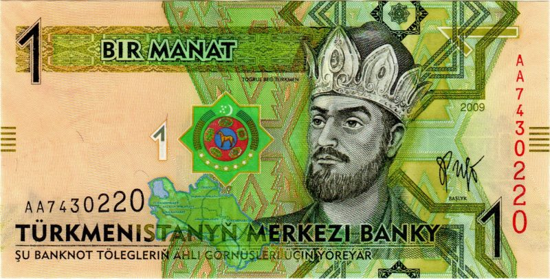 1 manat. Türkmenistan